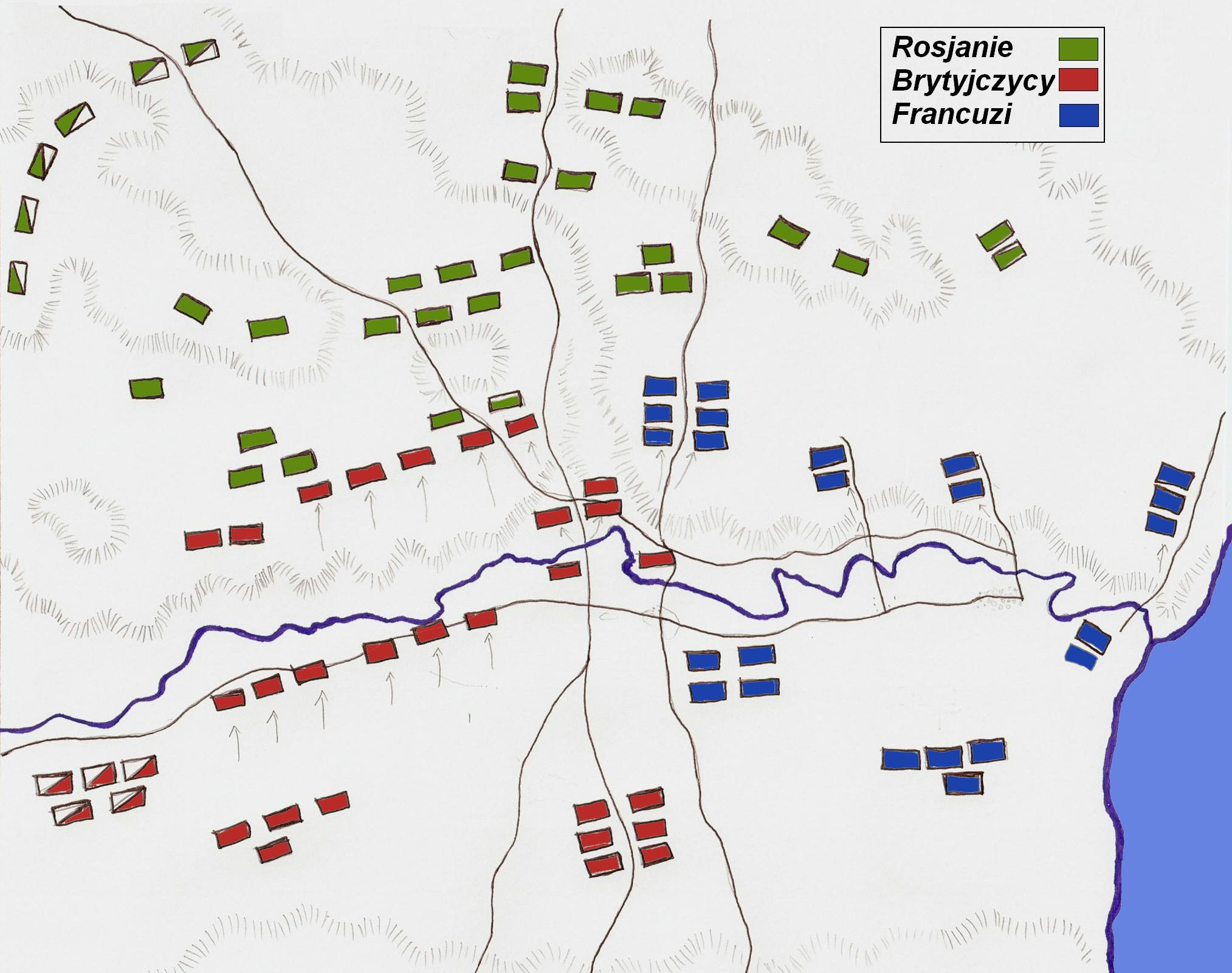 Mapa bitwy nad Almą